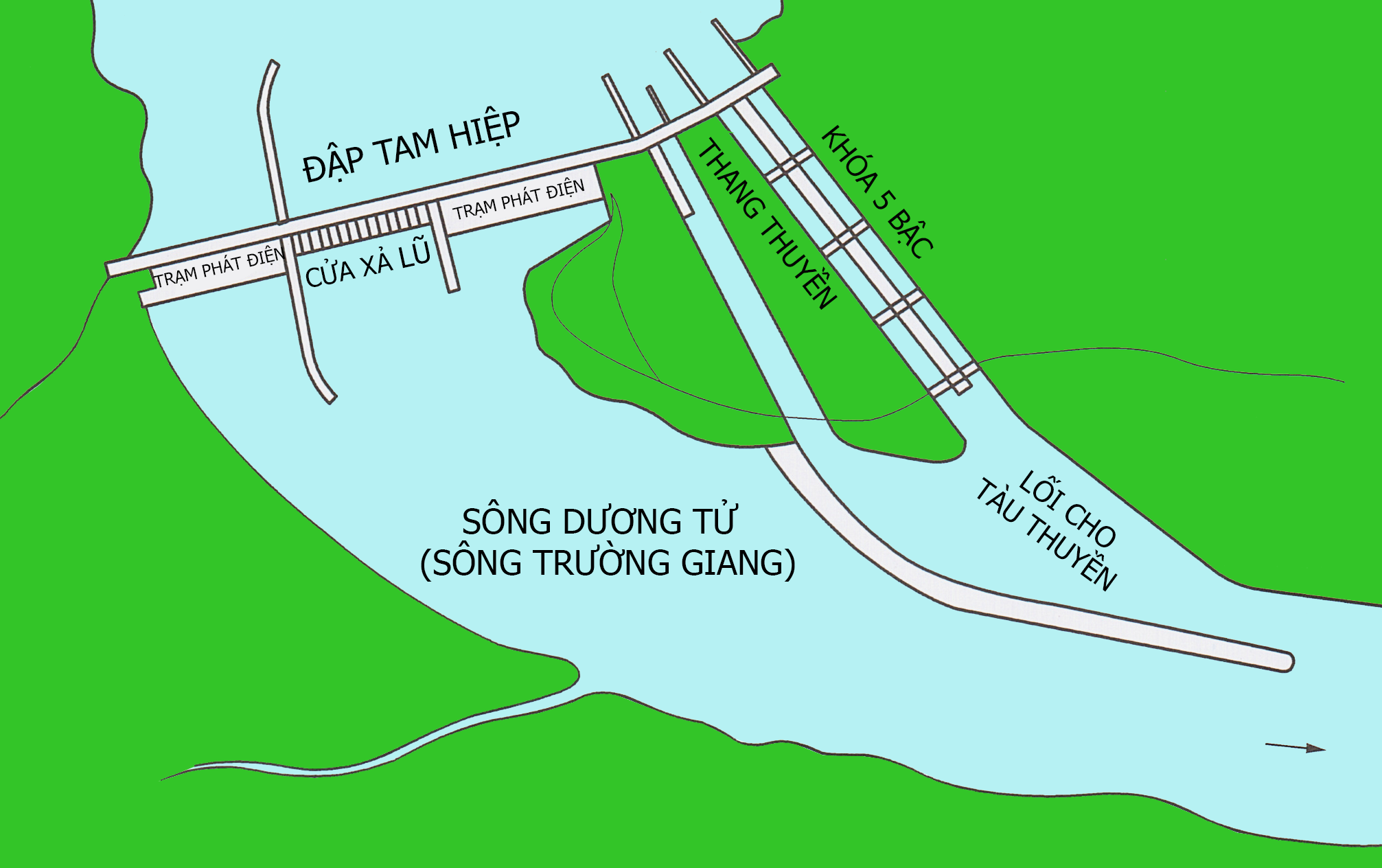 Three Gorges detail (Vietnamese captions)